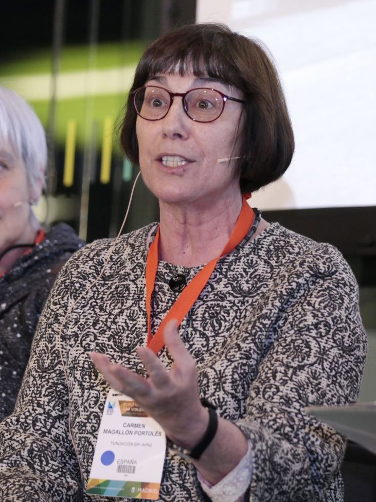 La violencia de género es uno de los problemas sociales más graves de nuestro tiempo. Trabajar desde los gobiernos en una nueva estructura que aborde cuestiones como la educación o la revisión de las políticas jurídicas es básico para erradicar esta violencia, tal y como han puesto de manifiesto los ponentes de la mesa de Violencia de Género, celebrada hoy en el marco del I Foro Mundial sobre Violencias Urbanas y Educación para la Convivencia y la Paz, que ha moderado Emilia Sáiz, del Secretariado Mundial del CGLU.